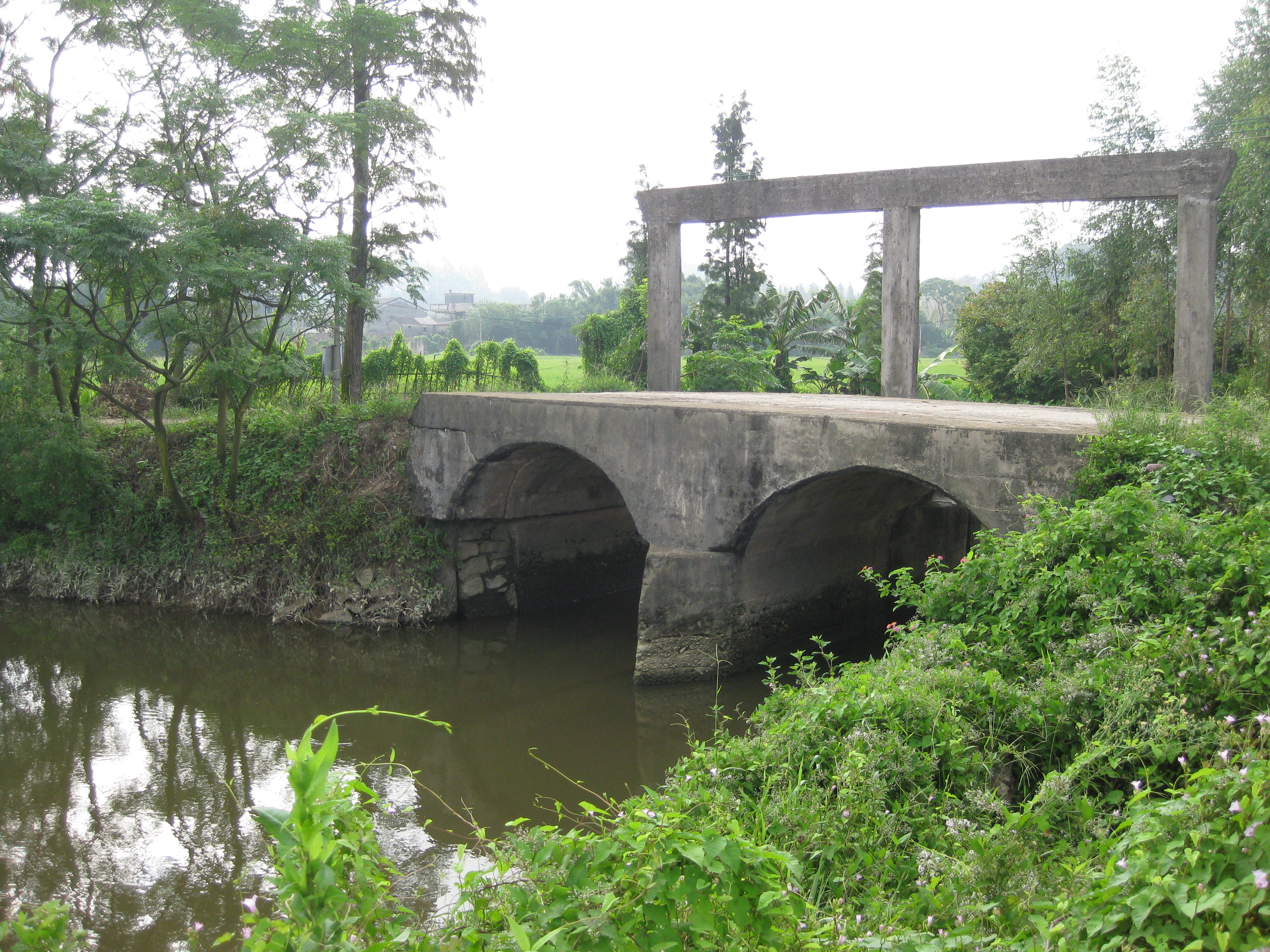 位于罗坑镇芦涌乡的铁路桥遗址